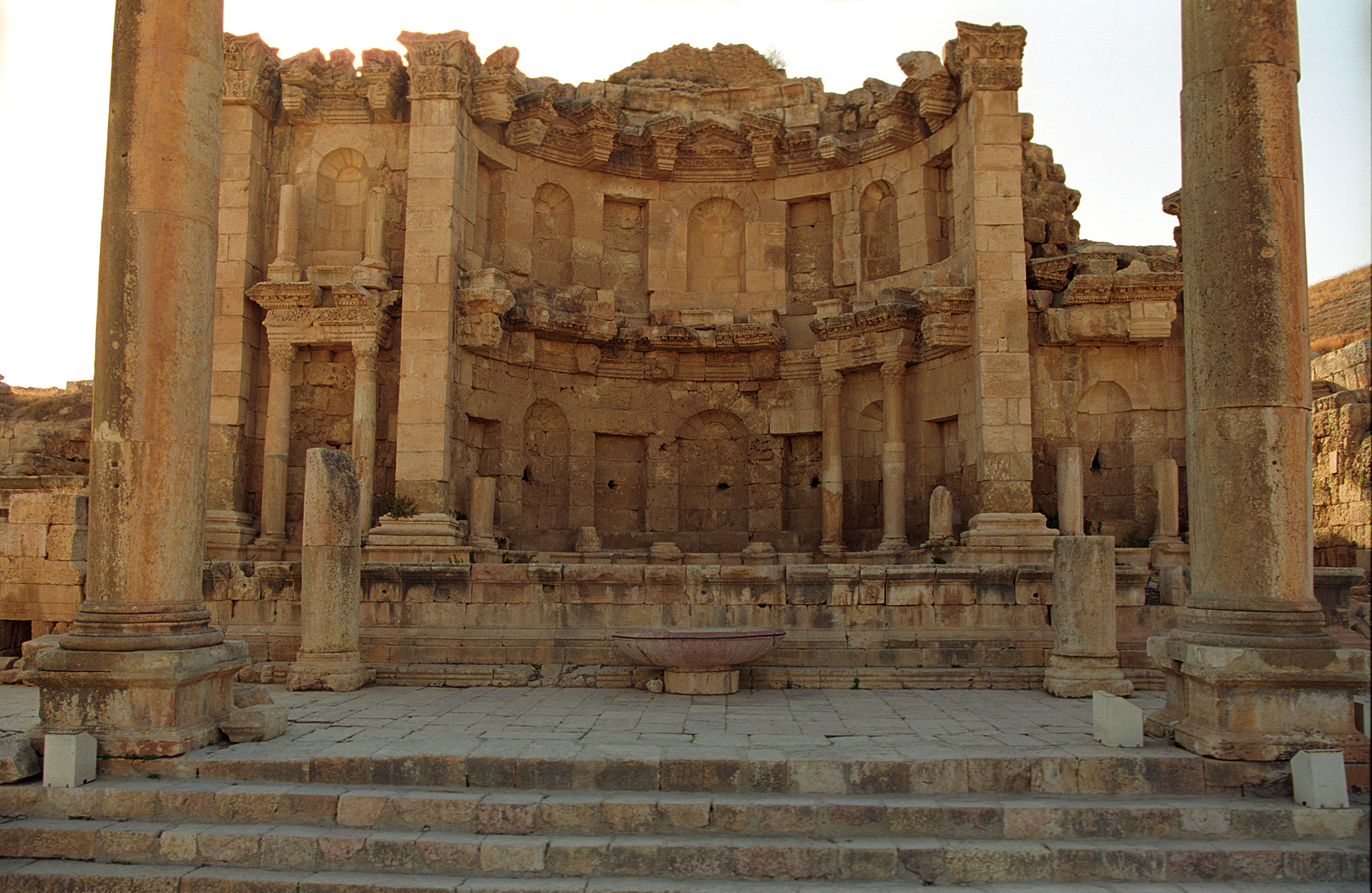 Jerash, Jordan